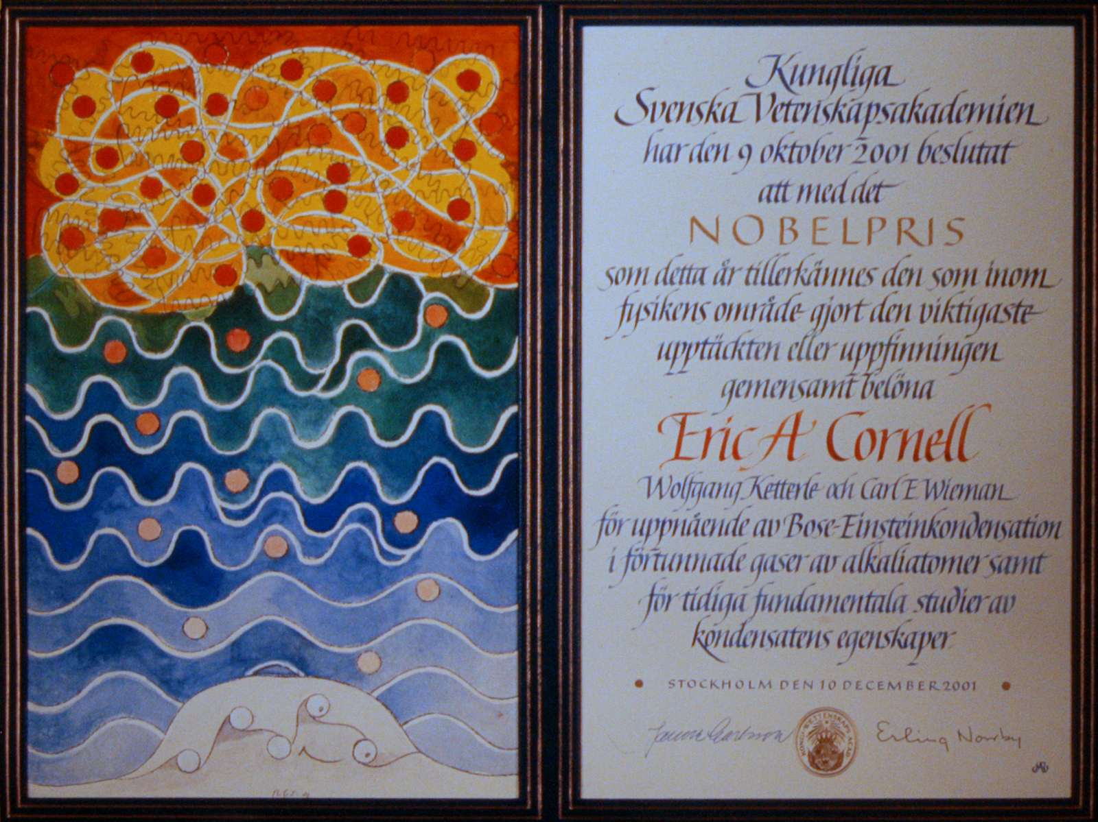 Musée Nobel à Stockholm